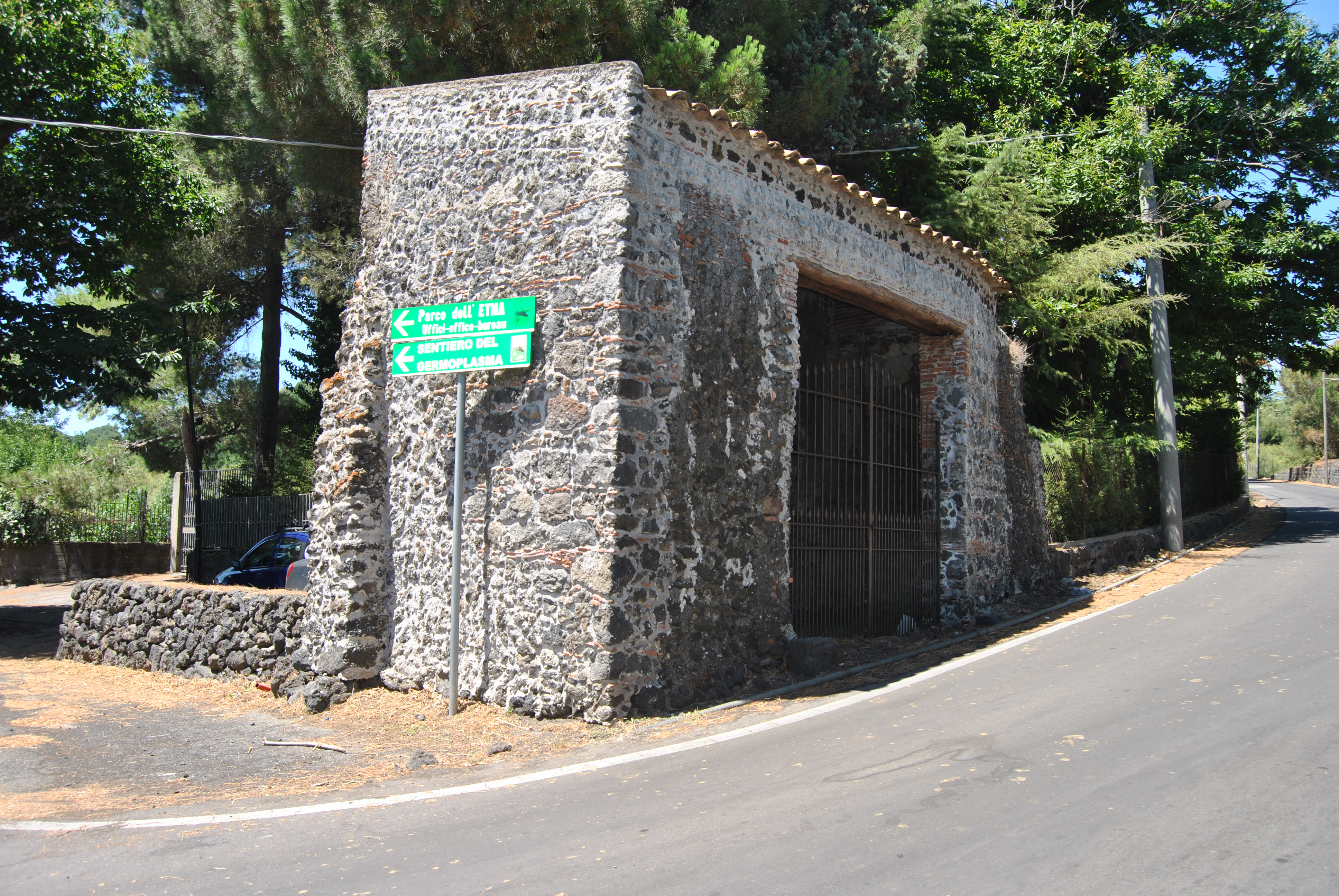 Ingresso dell'antico eremo benedettino-nicolosita (XIV secolo), oggi sede del Parco dell'Etna